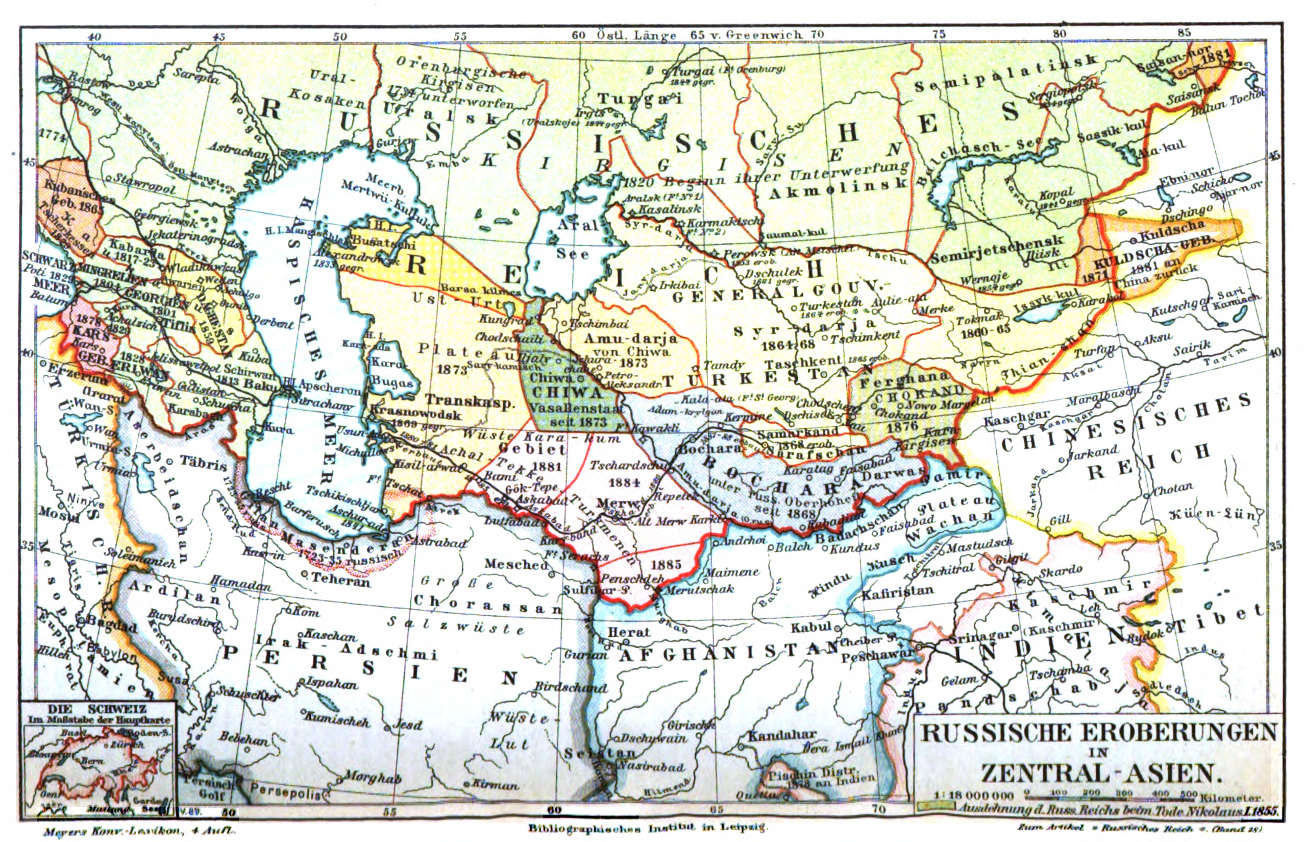 Karte „Russische Eroberungen in Zentral-Asien“ (1 : 18 000 000), zum Vergleich „Die Schweiz im Maßstabe der Hauptkarte“